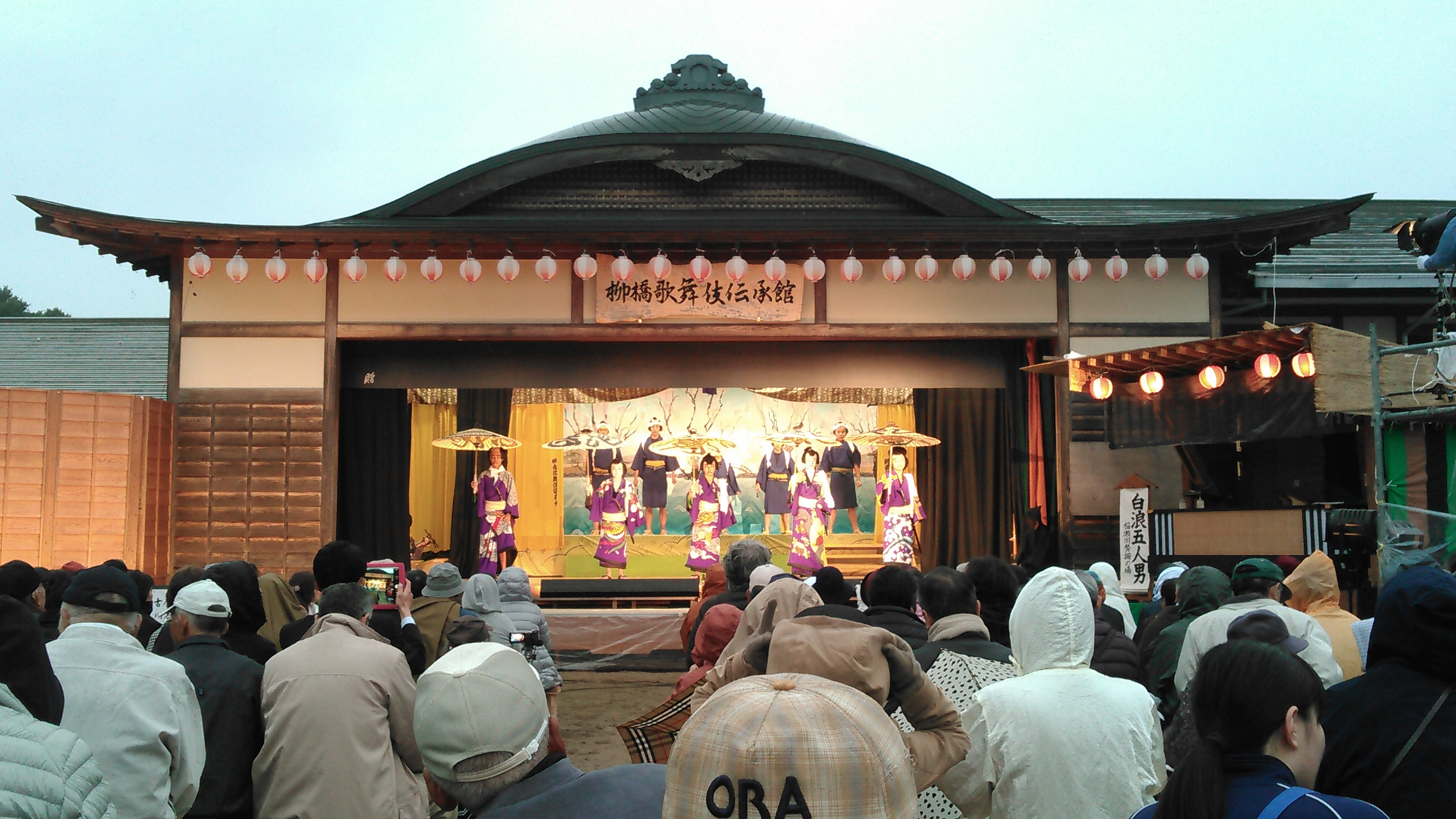 郡山市中田町 柳橋歌舞伎 2017定期公演 柳橋歌舞伎伝承館(黒石荘) 舞台の様子